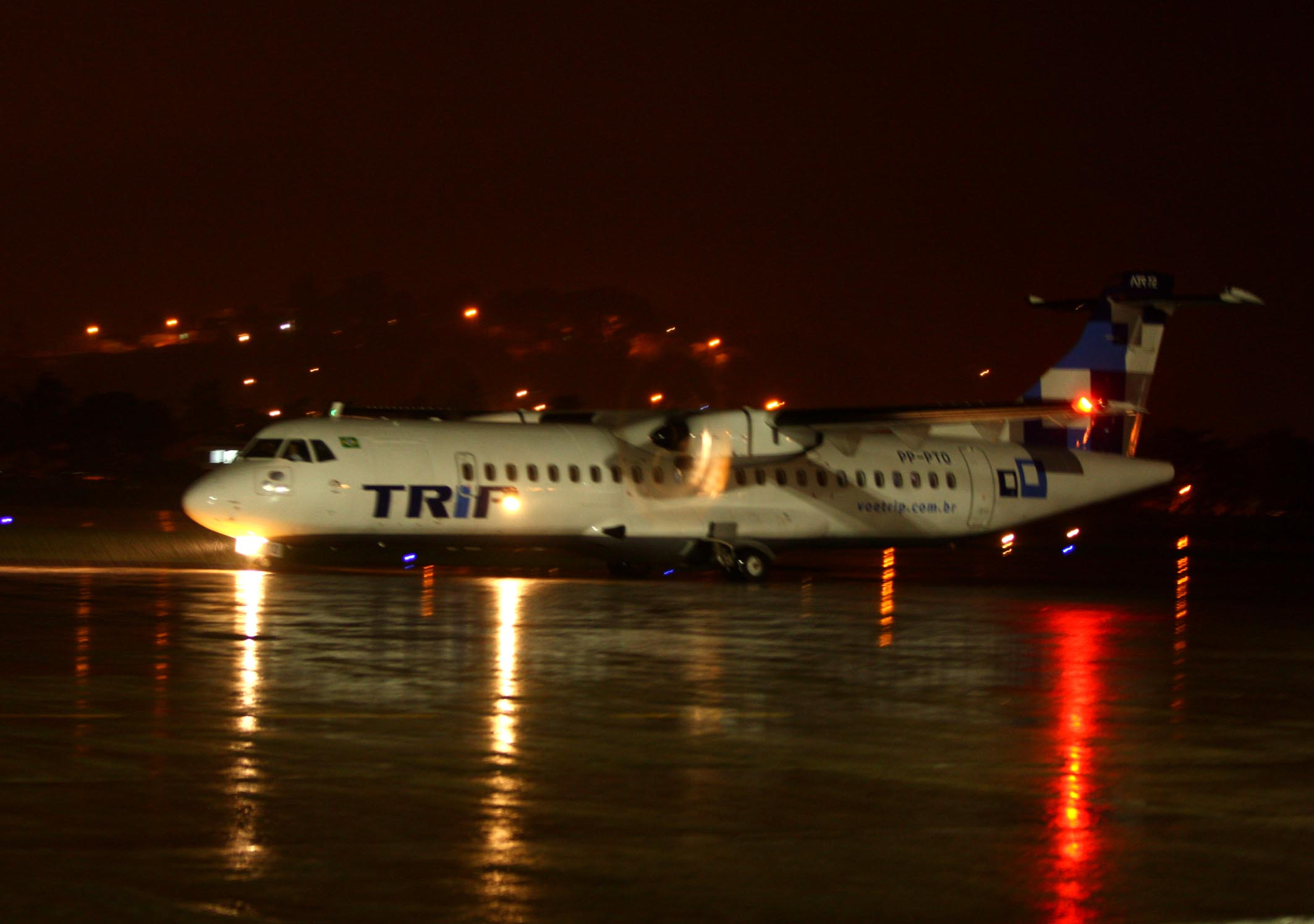 Voo da Trip Linhas Aéreas liga Ilhéus a Salvador Foto: Manu Dias / AGECOM